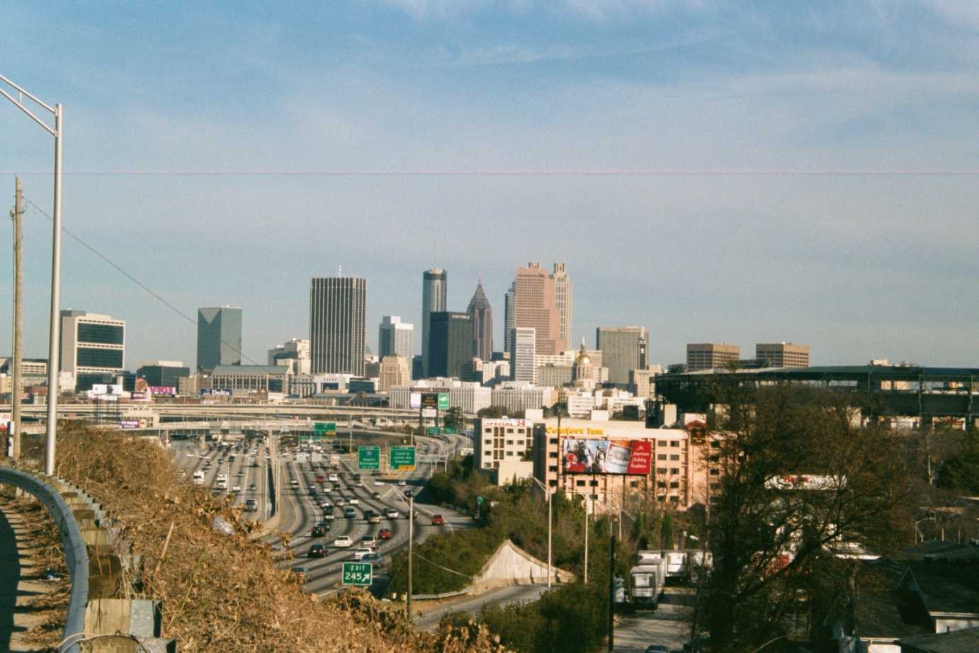 Atlanta, Georgia, USA.